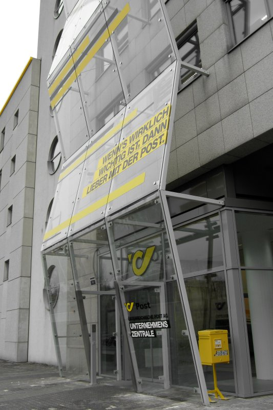 Österreichische Post AG - ehemalige Unternehmenszentrale in der Haidingergasse 1, Wien 3, vor der Übersiedlung in das neue Gebäude der "Post am Rochus" am Rochusmarkt in Wien 3 im Jahr 2019